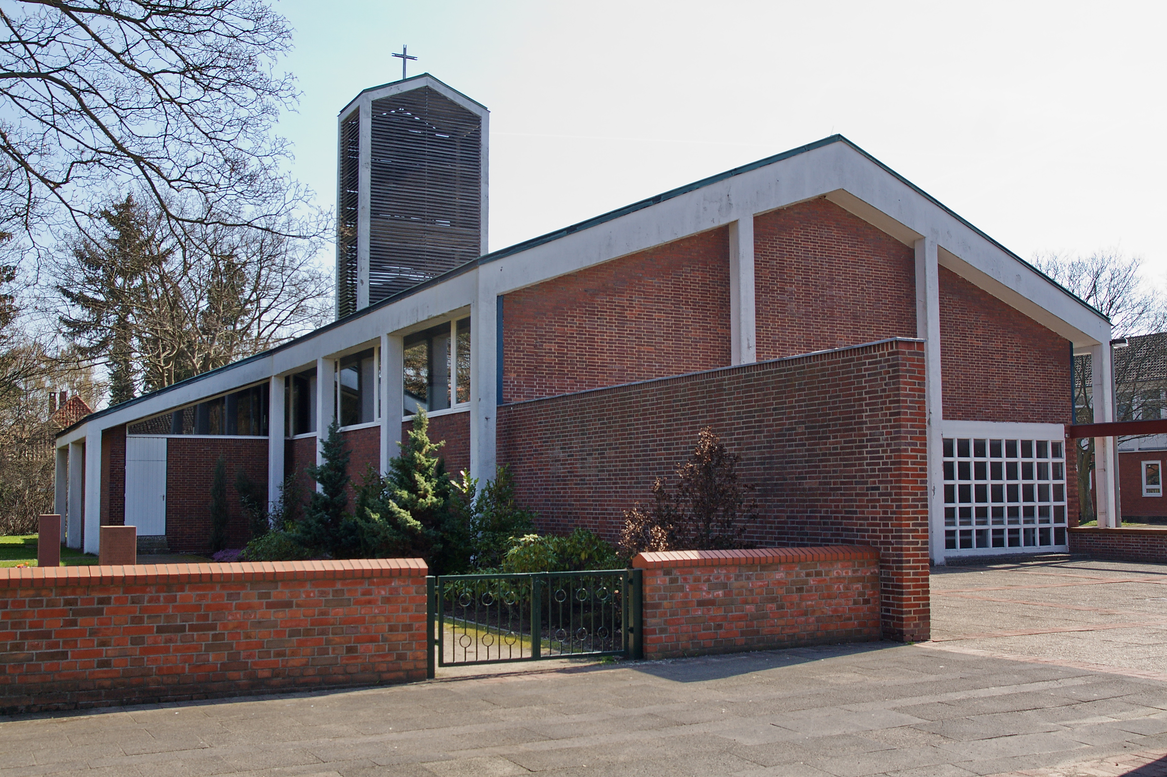 St.-Johannis-Kirche in Bemerode (Hannover), Niedersachsen, Deutschland